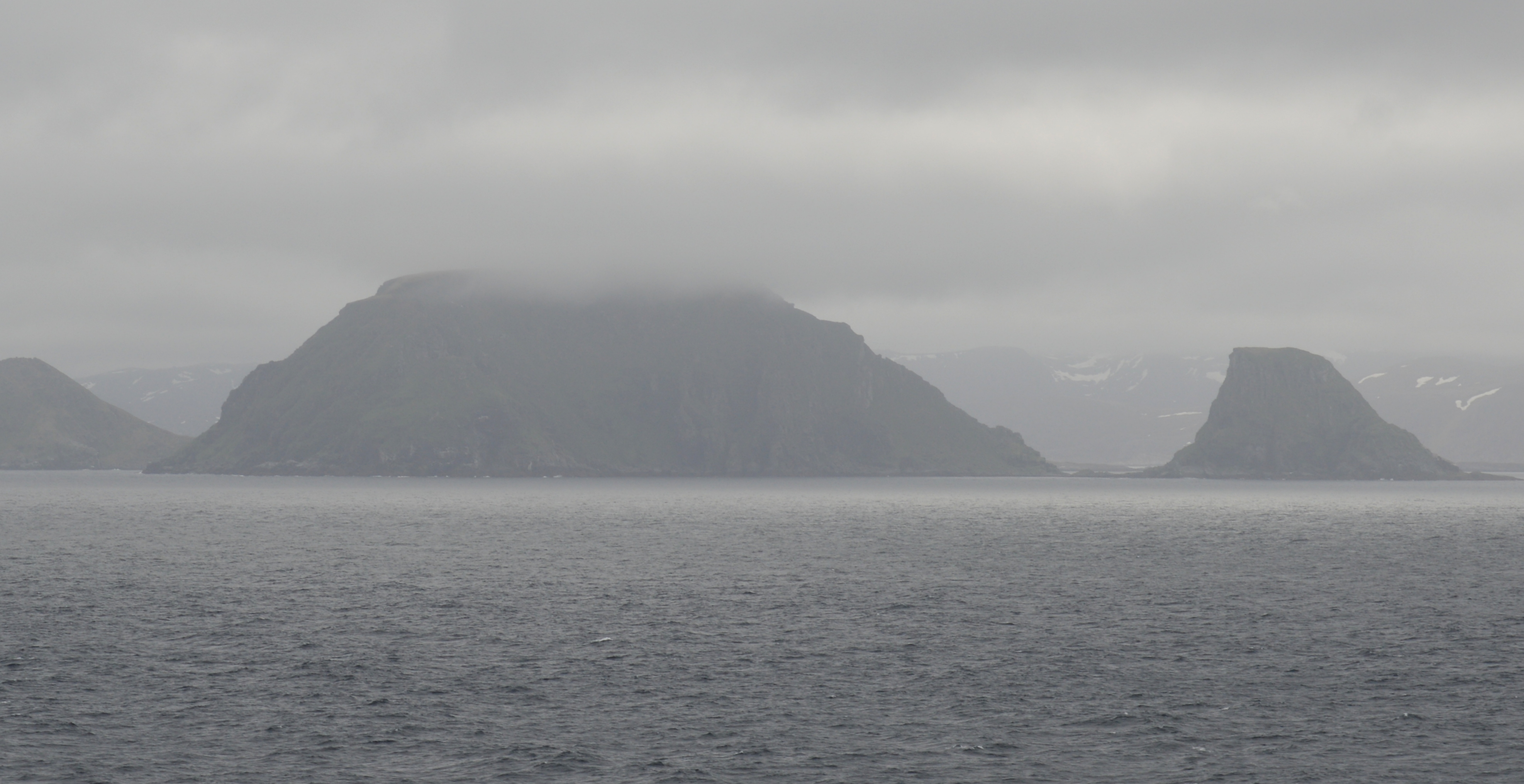 Storstappen